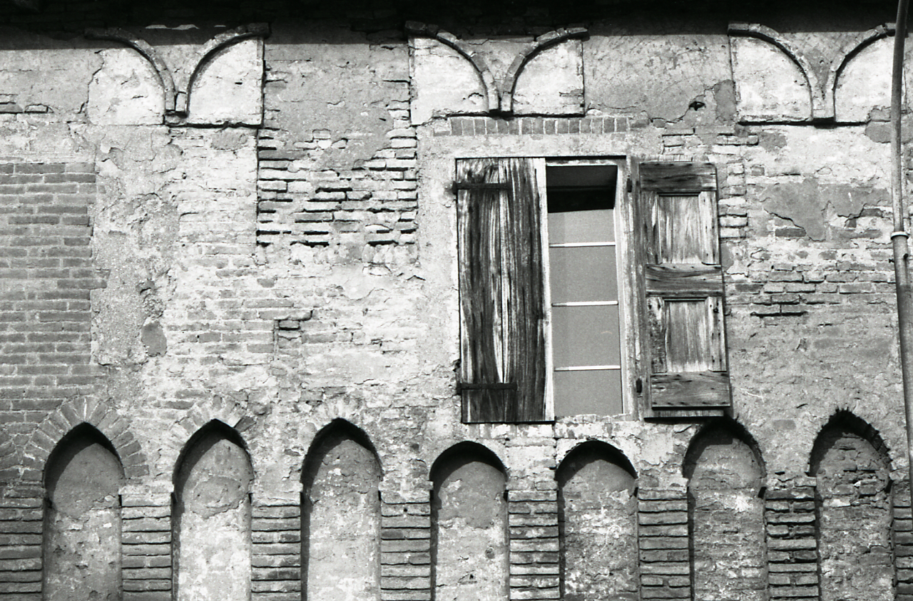 Cento. La Rocca. Esterno: vedute e particolari. Servizio fotografico : Cento, 1975 / Paolo Monti. - Strisce: 3, Fotogrammi complessivi: 14 : Negativo b/n, gelatina bromuro d'argento/ pellicola ; 35 mm. - ((Sul portanegativi: N[I]K[MA]T FP4. - Il fotogramma n. 12 è leggermente tagliato nella seconda metà. - Occasione: Documentazione del territorio della provincia di Ferrara e centri storici minori. - Fonte: Agenda di Paolo Monti: Leica 1501-3000 Controllo numerazione (1950-1978), presso Archivio Paolo Monti. - Fonte: Fattura di Paolo Monti: IV. Commesse/ Fattura n. 11 (1975/04/29), presso Archivio Paolo Monti. - Fonte: Monografia: Territorio ferrarese: un programma di governo della Regione e delle autonomie locali, catalogo della mostra, Ferrara 1975, a cura di Roberto FREGNA, Modena, Soc. Immobiliare & Poligrafica emiliana (1975)